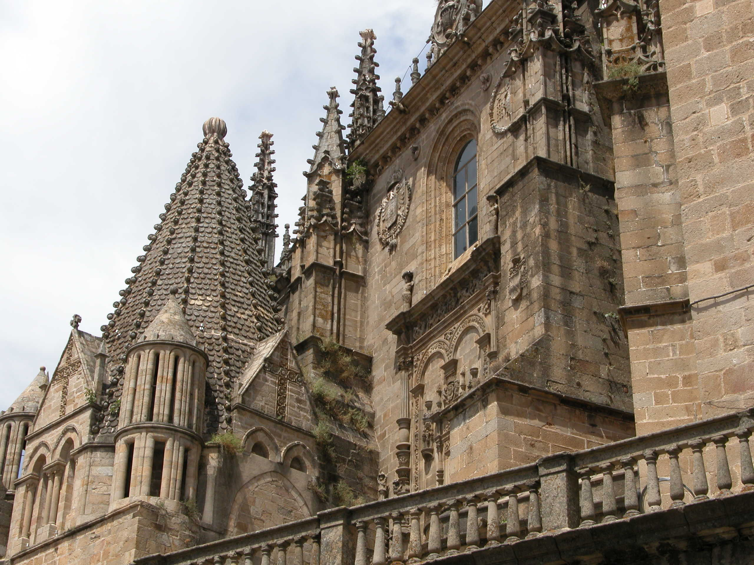 Fachada de La Catedral de Plasencia, atribuida a Diego de Siloé